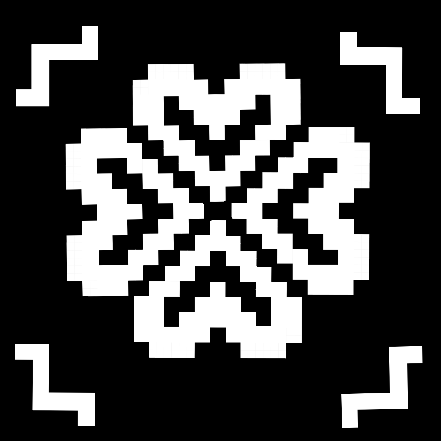 Motif tricot norvégien, mothjart